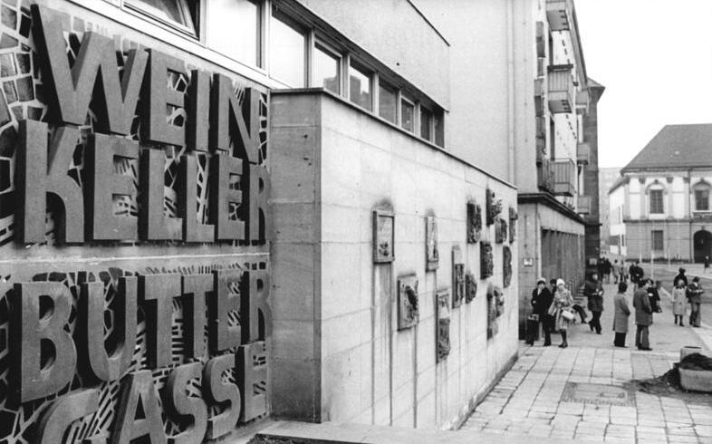 Magdeburg, "Alter Markt", Weinkeller, Gaststätte Zum Beitrag "Buttergasse-Überraschung unter dem Magdeburger Alten Markt" Die Entdeckung des Weinkellers "Buttergasse" in Magdeburg wurde schon für manchen Besucher der Elbestadt zum Erlebnis. Dieser Weinkeller wurde in fast 750 Jahre alte Gewölbe unter dem Alten Markt eingerichtet, die ehemals eine von vier Kaufhallen bildeten und die, unter dem Schutt von Jahrhunderten begraben, lange Zeit in Vergessenheit geraten waren. (Bitte beachten Sie hierzu auch die Fotos R0405-339N und 341N sowie 342N!)